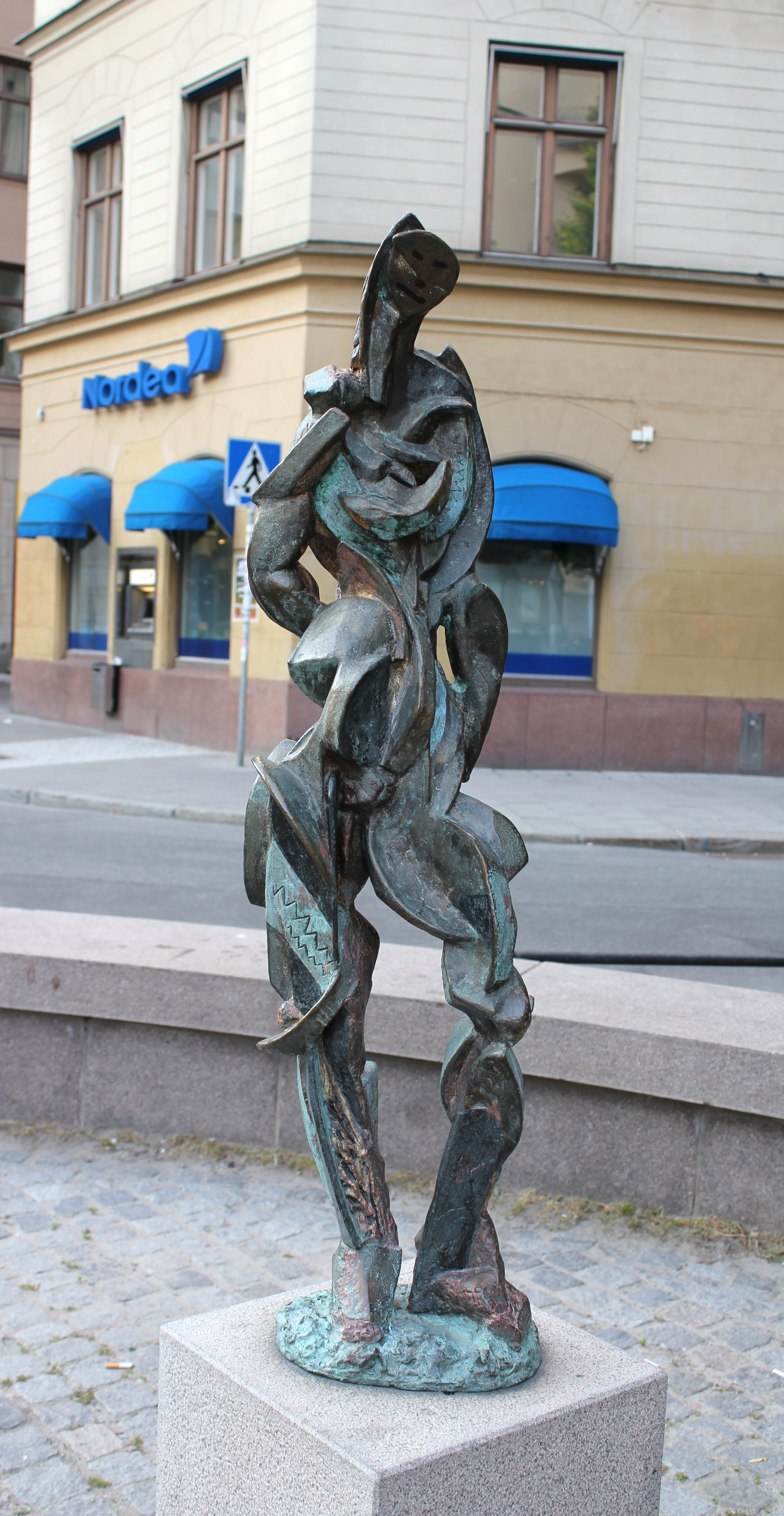 Stående figur av Rune Rydelius i korsningen Katarina Bangata/Götgatan, Södermalm, Stockholm.